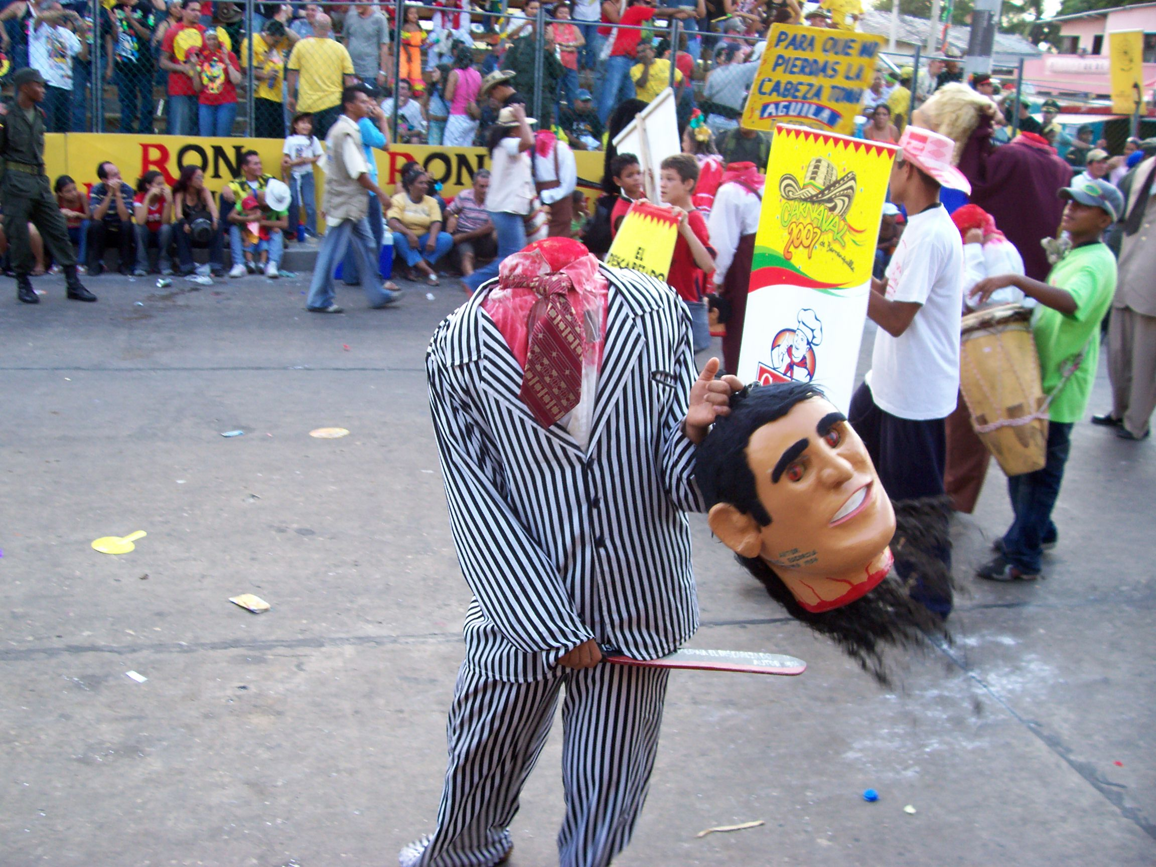 The Barranquilla's Carnival "El descabezado"